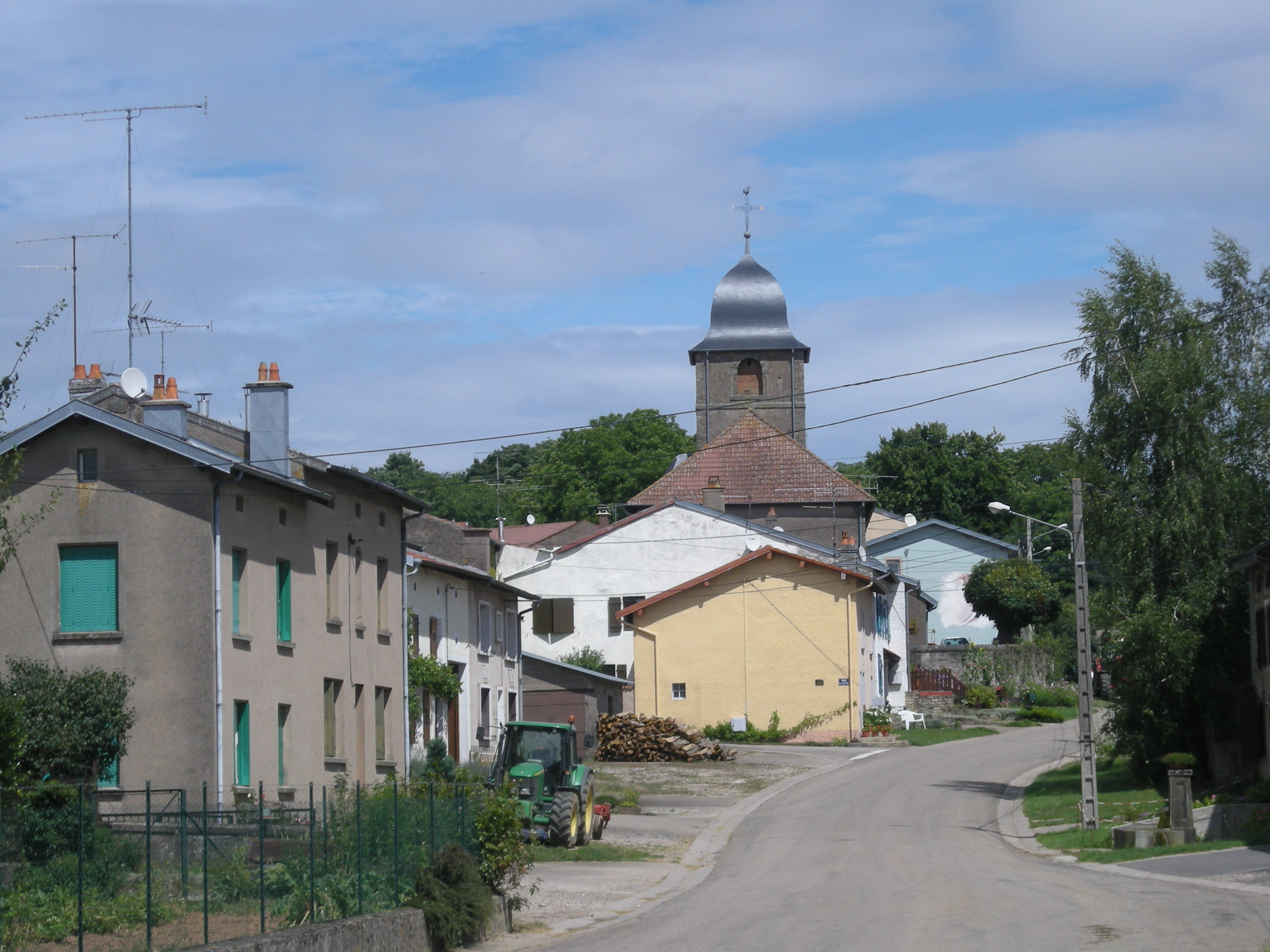 Vue générale de Reherrey (Meurthe-et-Moselle)